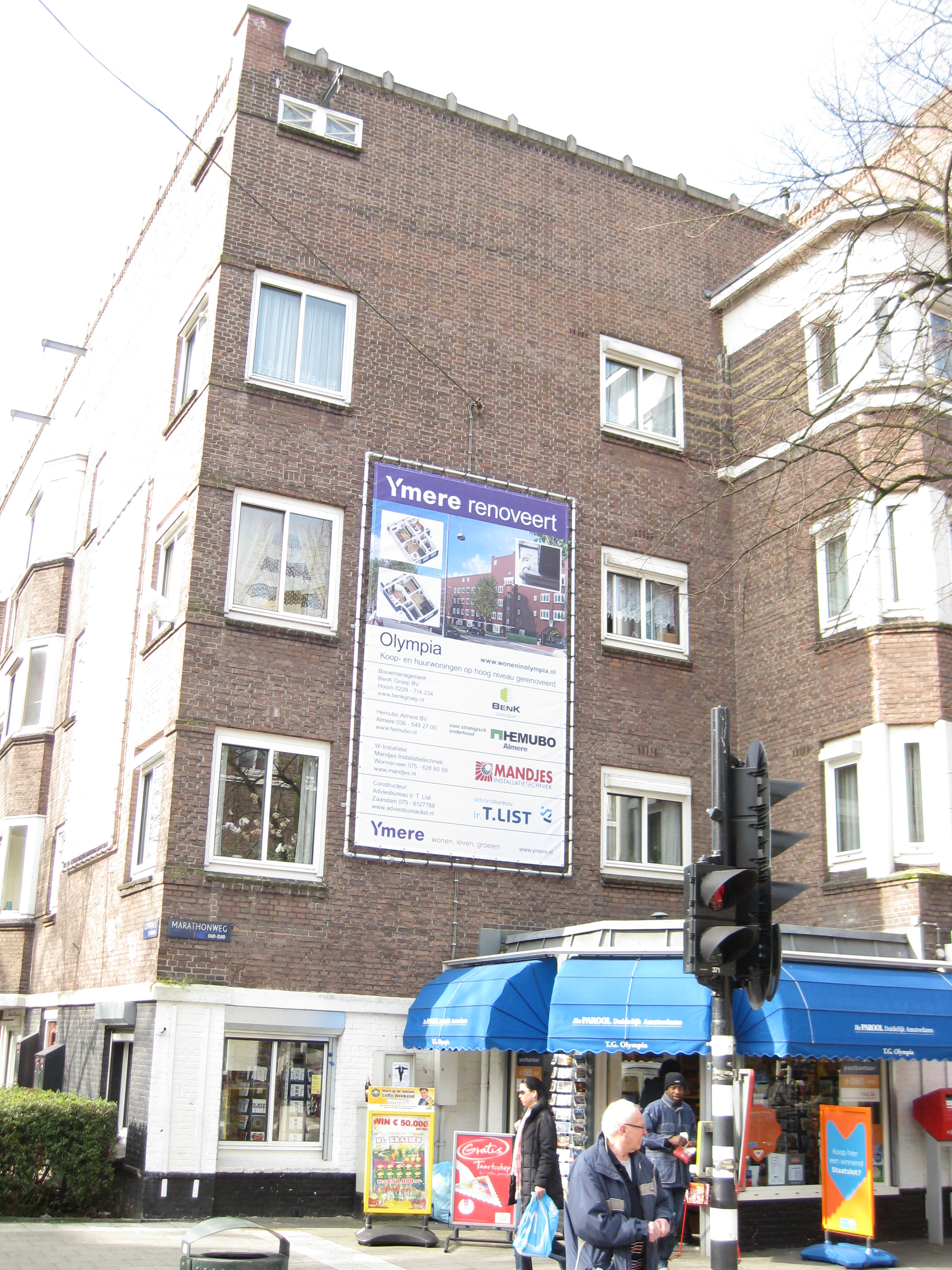 Gemeentelijk monument Olympia, hoek Olympiaweg-Marathonweg Amsterdam